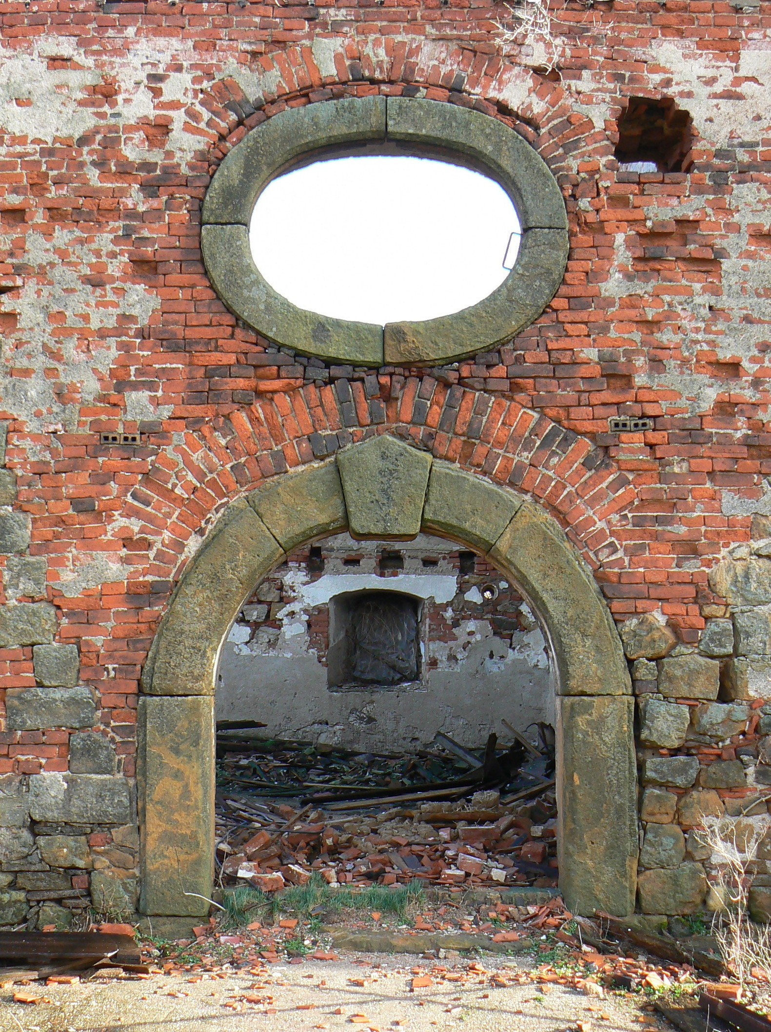 Das barocke Rundbogenportal mit darüber liegendem Ochsenaugen-Fenster (Oculus) ist ein wesentliches Merkmal Klengelscher Bauten.